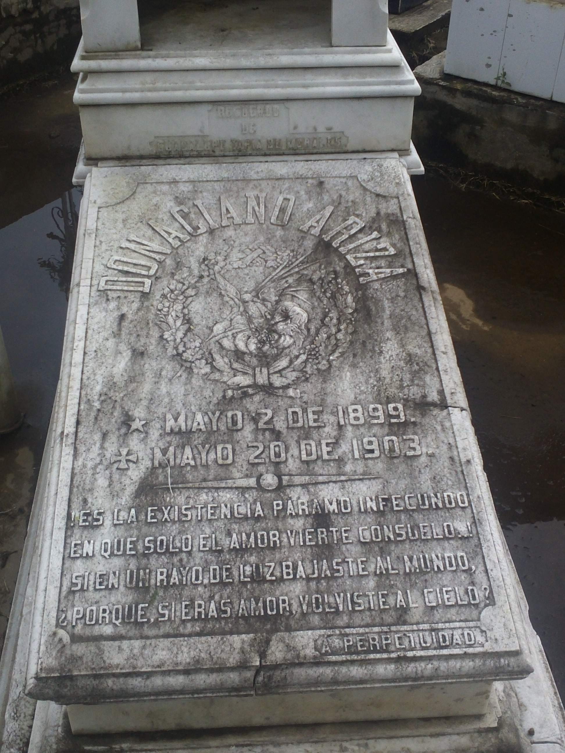 Epitafio en el panteón de Orizaba